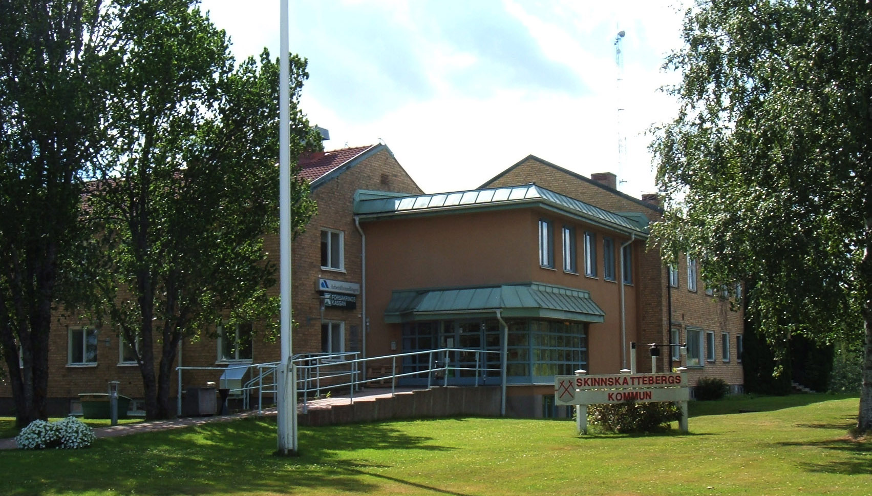 Kommunhuset i Skinnskatteberg